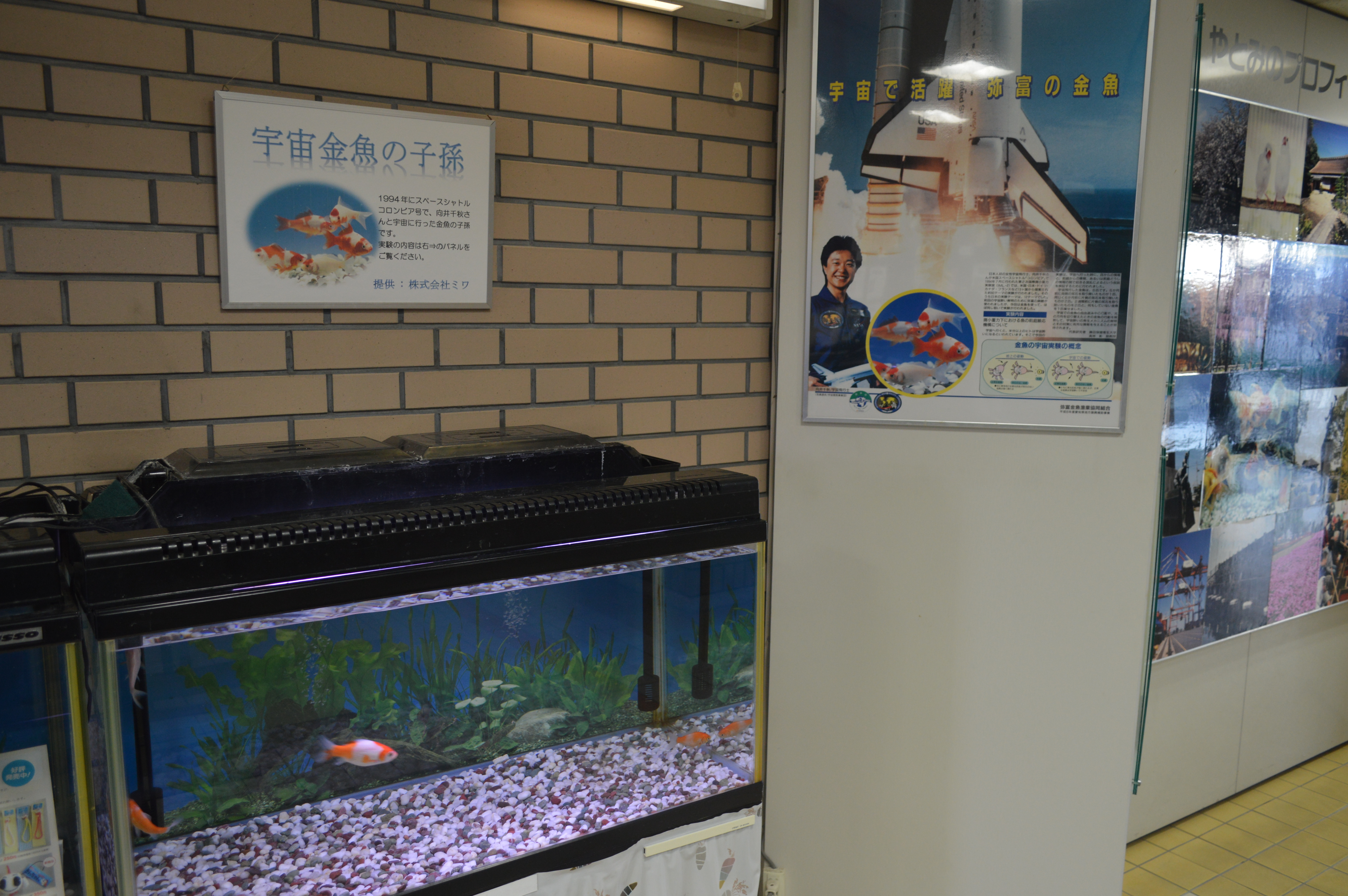 愛知県弥富市にある弥富市歴史民俗資料館。「宇宙金魚」の子孫。